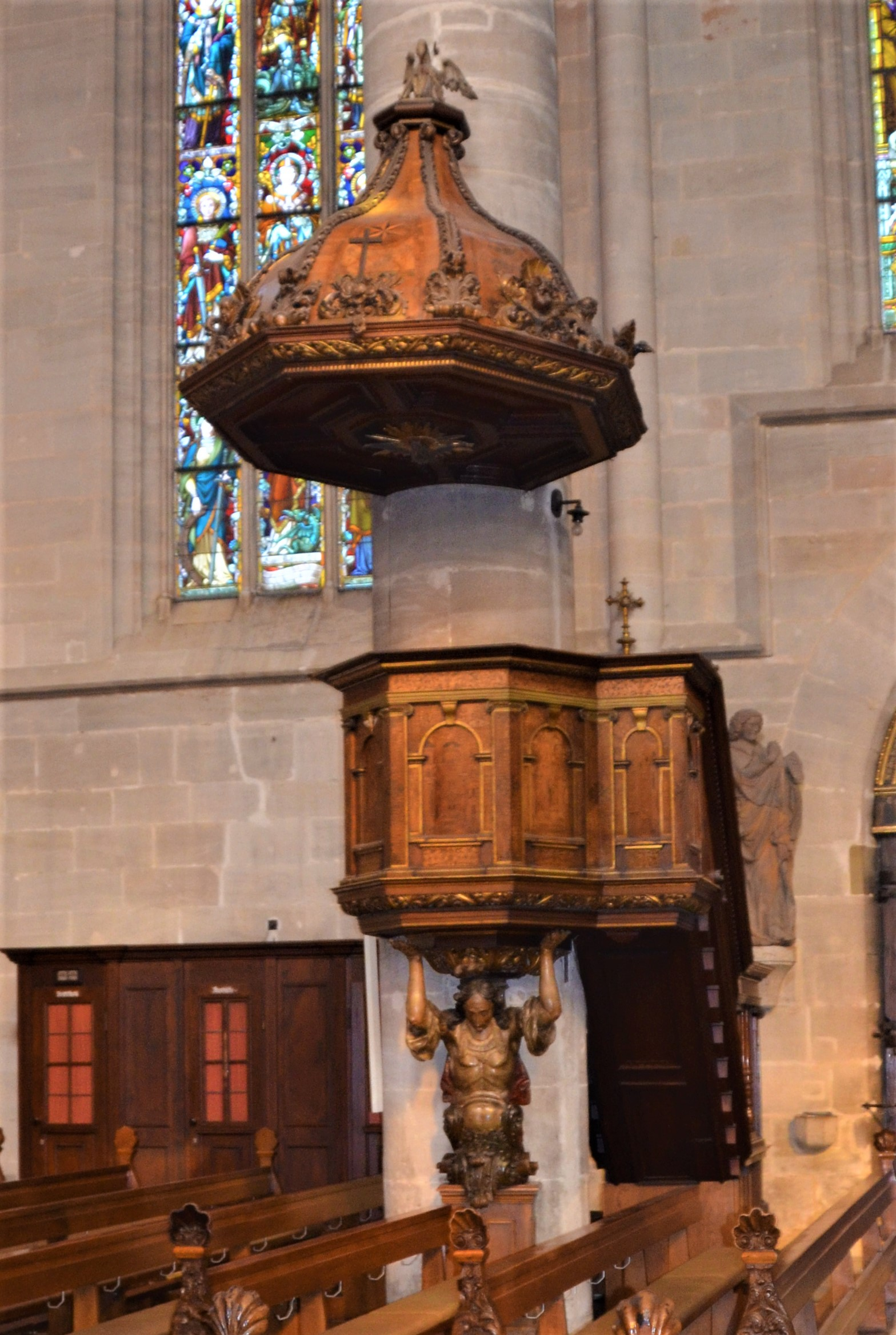 Kanzel im Heilig-Kreuz-Münster Schwäbisch Gmünd